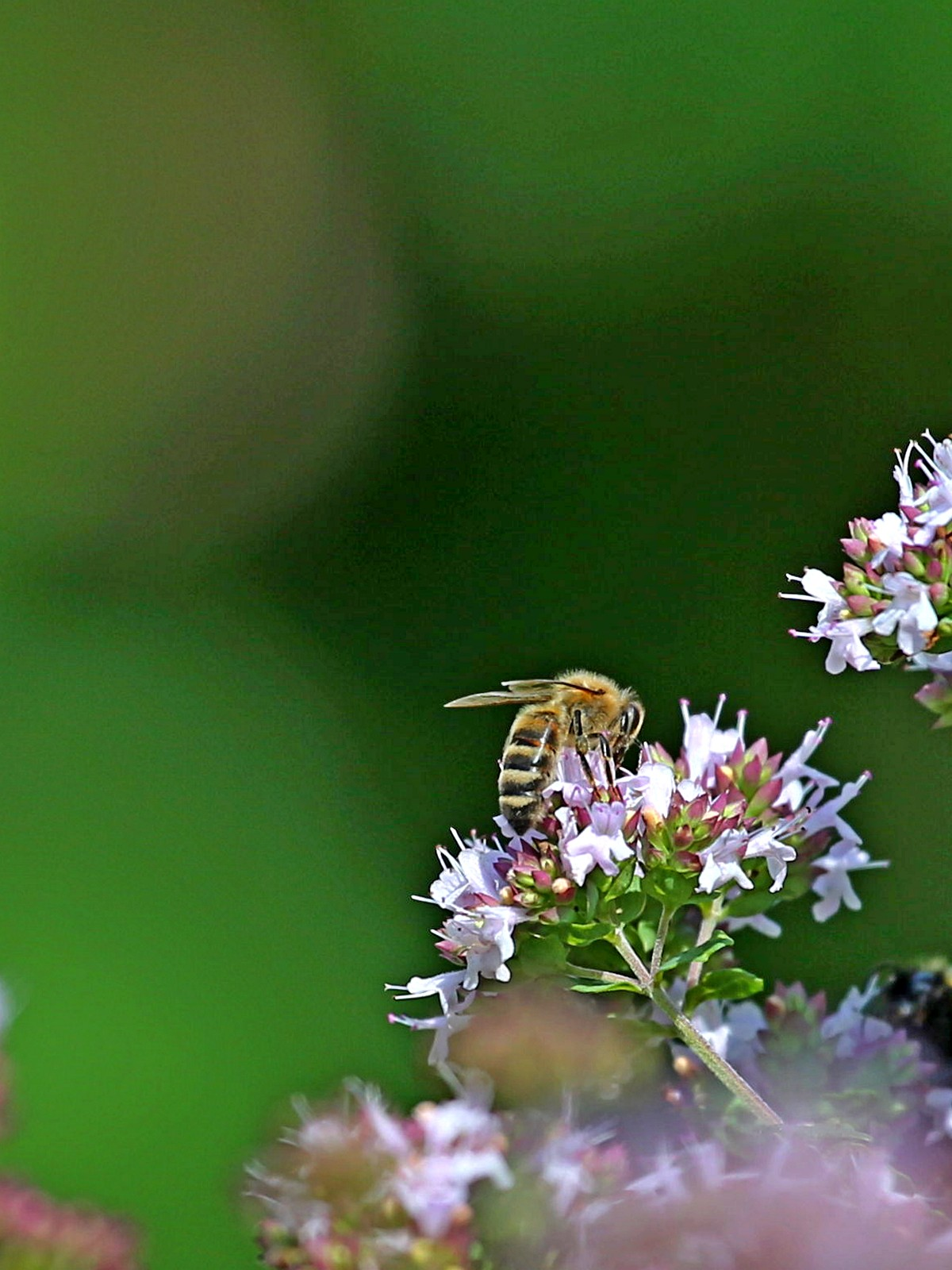 Honigbiene auf Dost